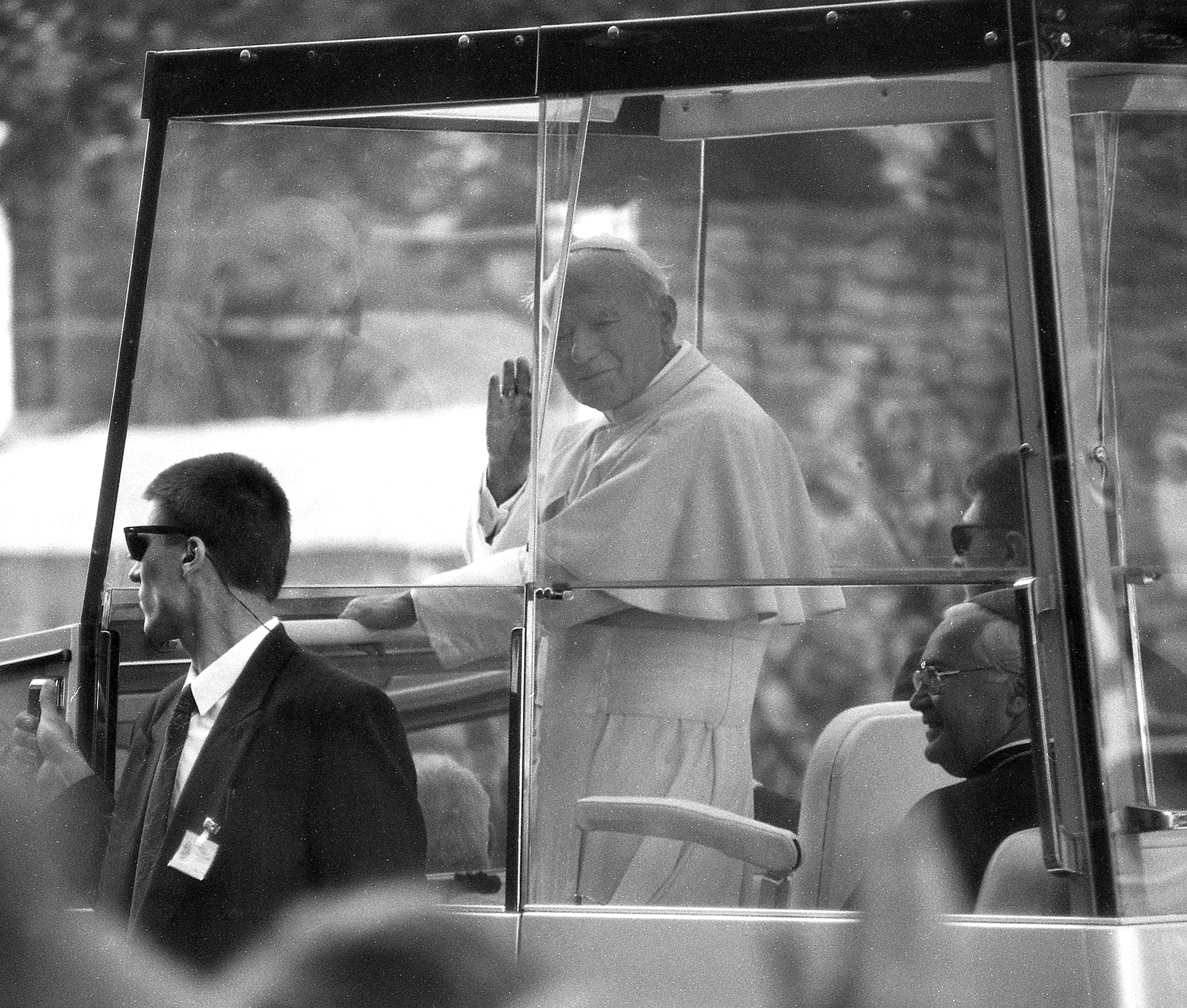 Johannes Paulus II